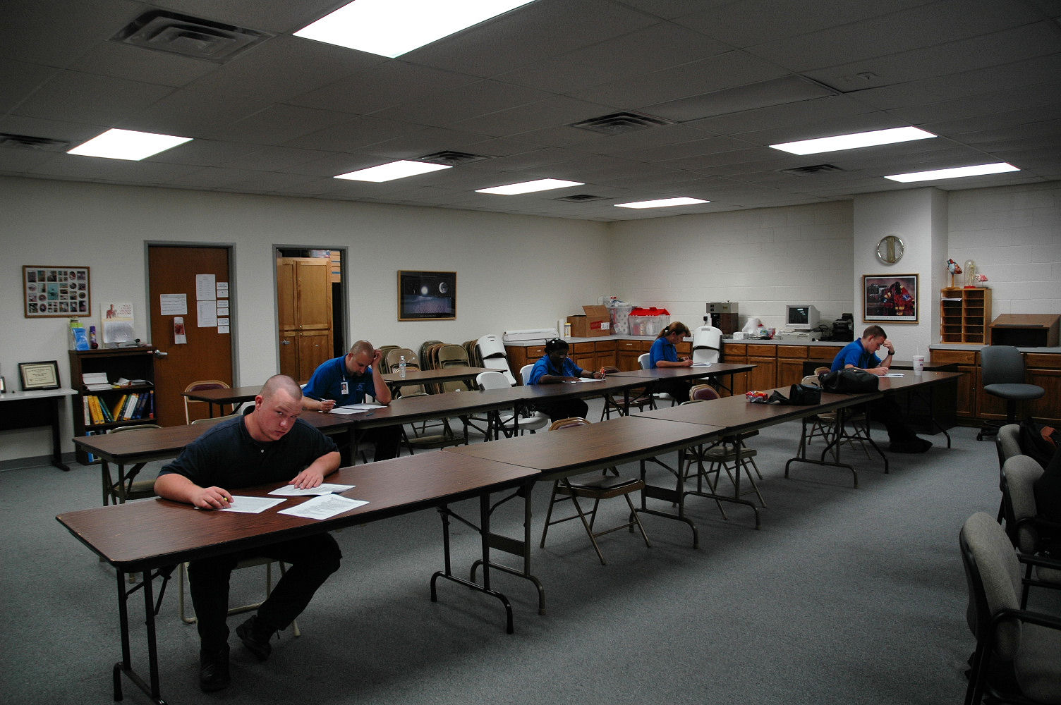 Azterketa batean.